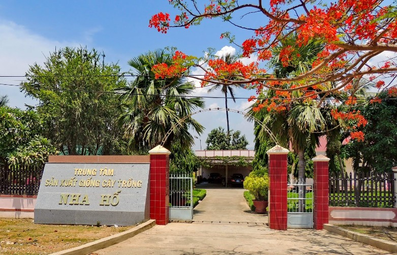 Trung tâm Nha Hố